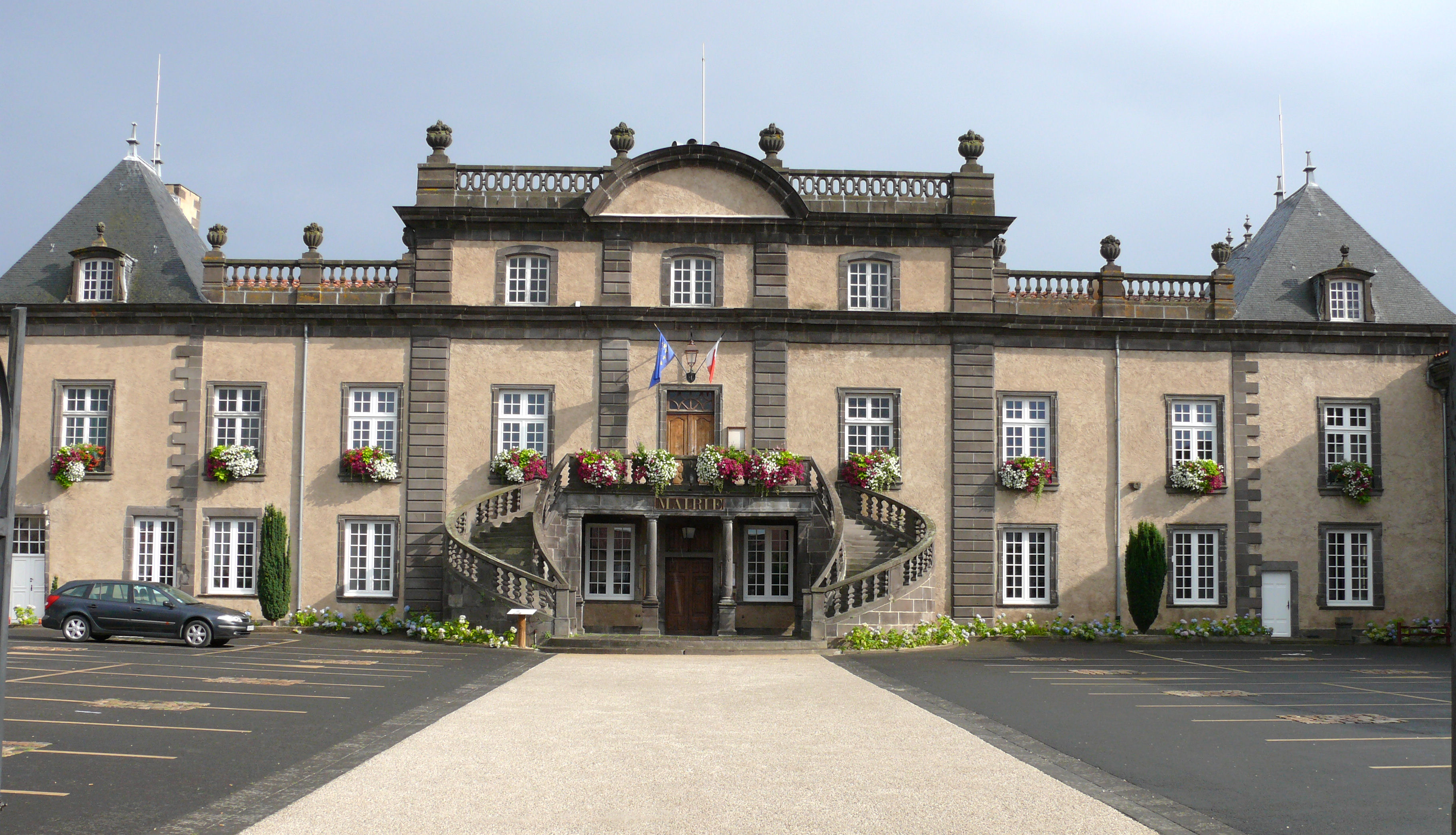 Pont-du-Château - Château-mairie - Façade sur cour